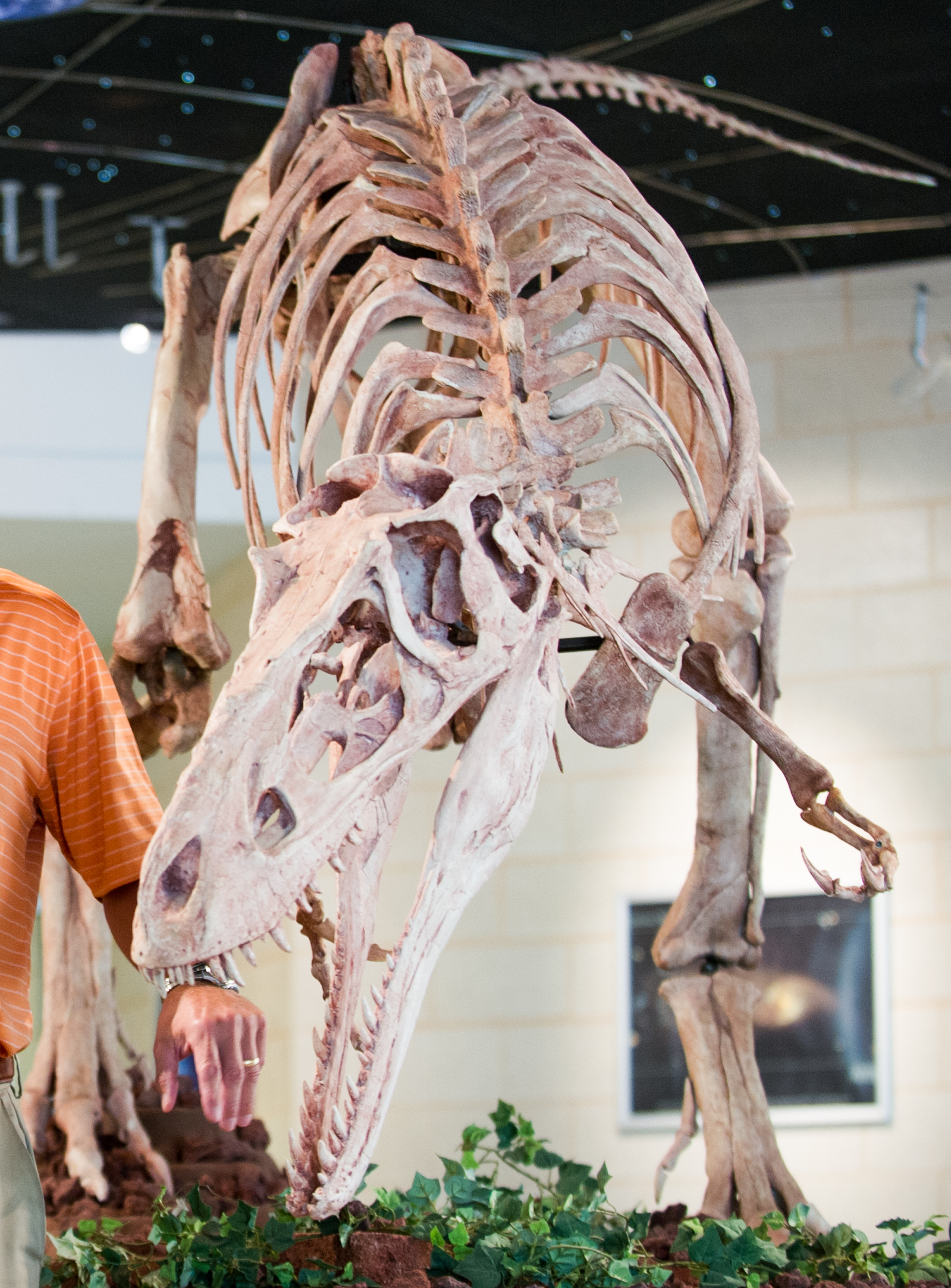 14365- dinosaur 4155